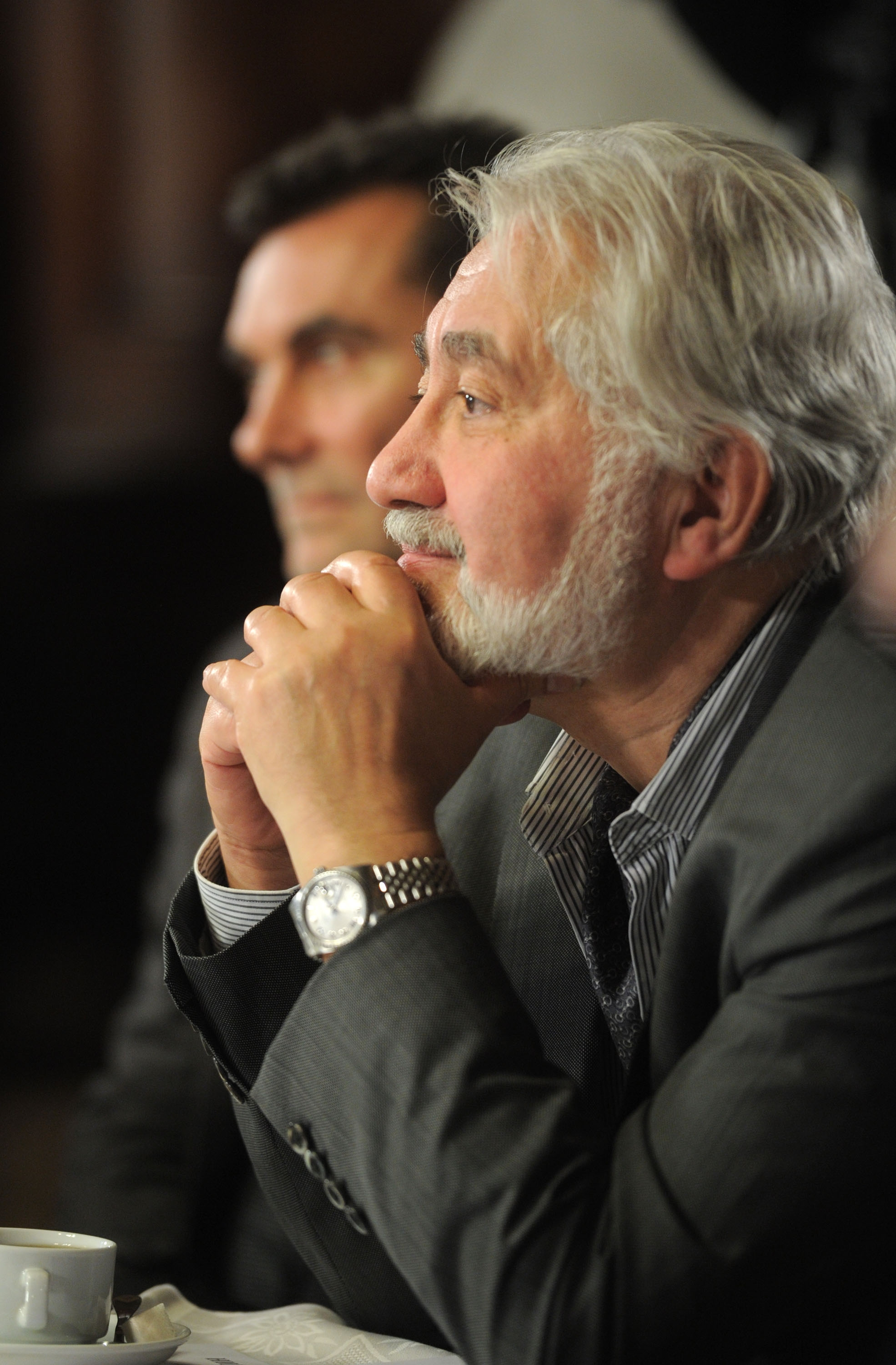 Художественный руководитель «Академического Малого драматического театра - Театр Европы» Л. А. Додин